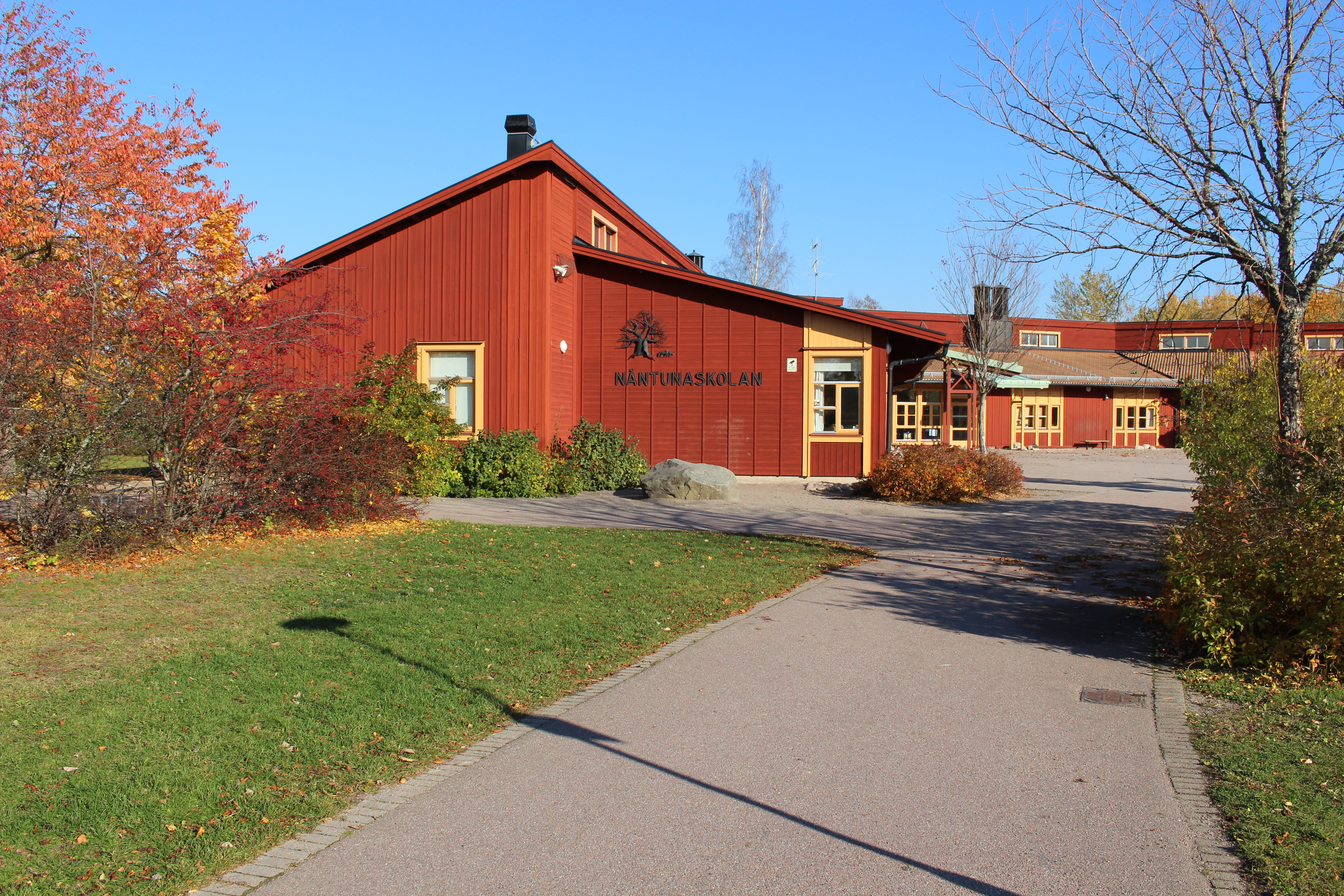 Nåntunaskolan från sydväst.